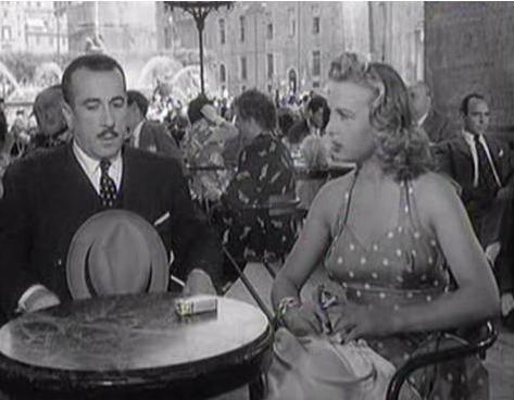 Fotogramma dal film "Lo scocciatore", 1954. Scena di Via Padova 46